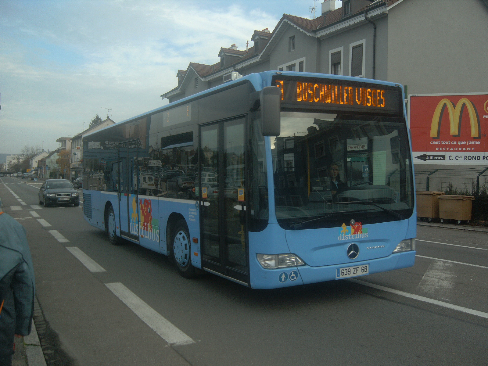 Citaro K de Distribus à la limite entre Saint-Louis et le quartier de Bourgfelden. Ligne 2 vers Buschwiller